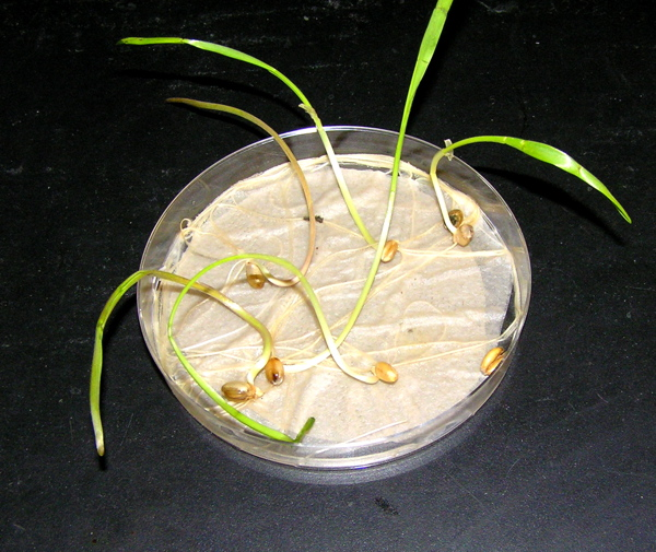 Beschreibung: gekeimte Weizenkörner Fotograf: Benutzer:BMK 2006-02-03 Please send reference and voucher copy to BMK(at)clever.ms Bitte Quellenangabe und Beleg an BMK(at)clever.ms